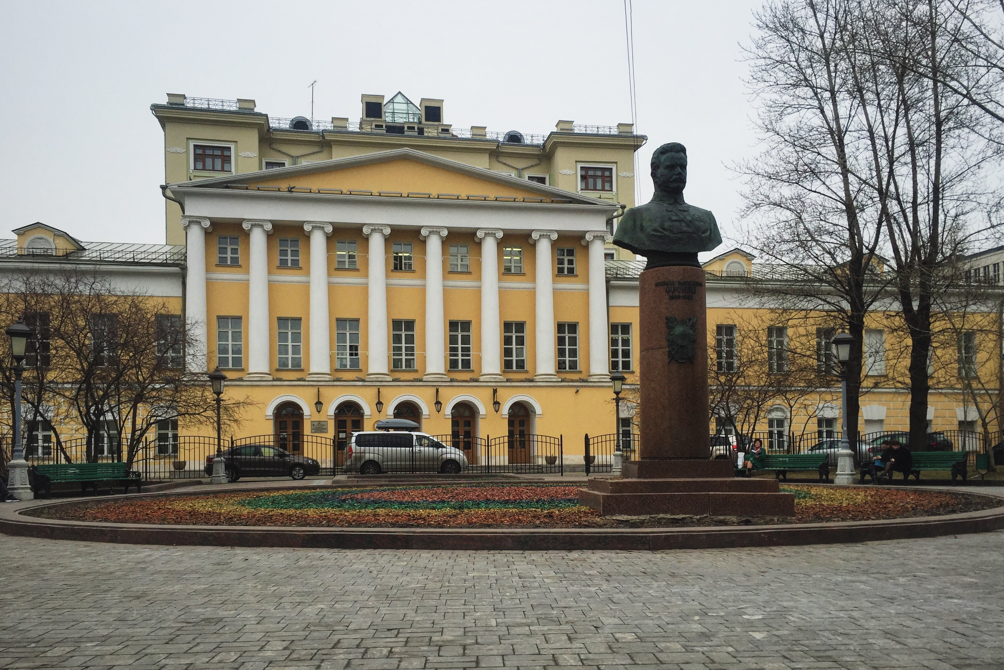 Знаменка Moscow in 2016; Москва в 2016